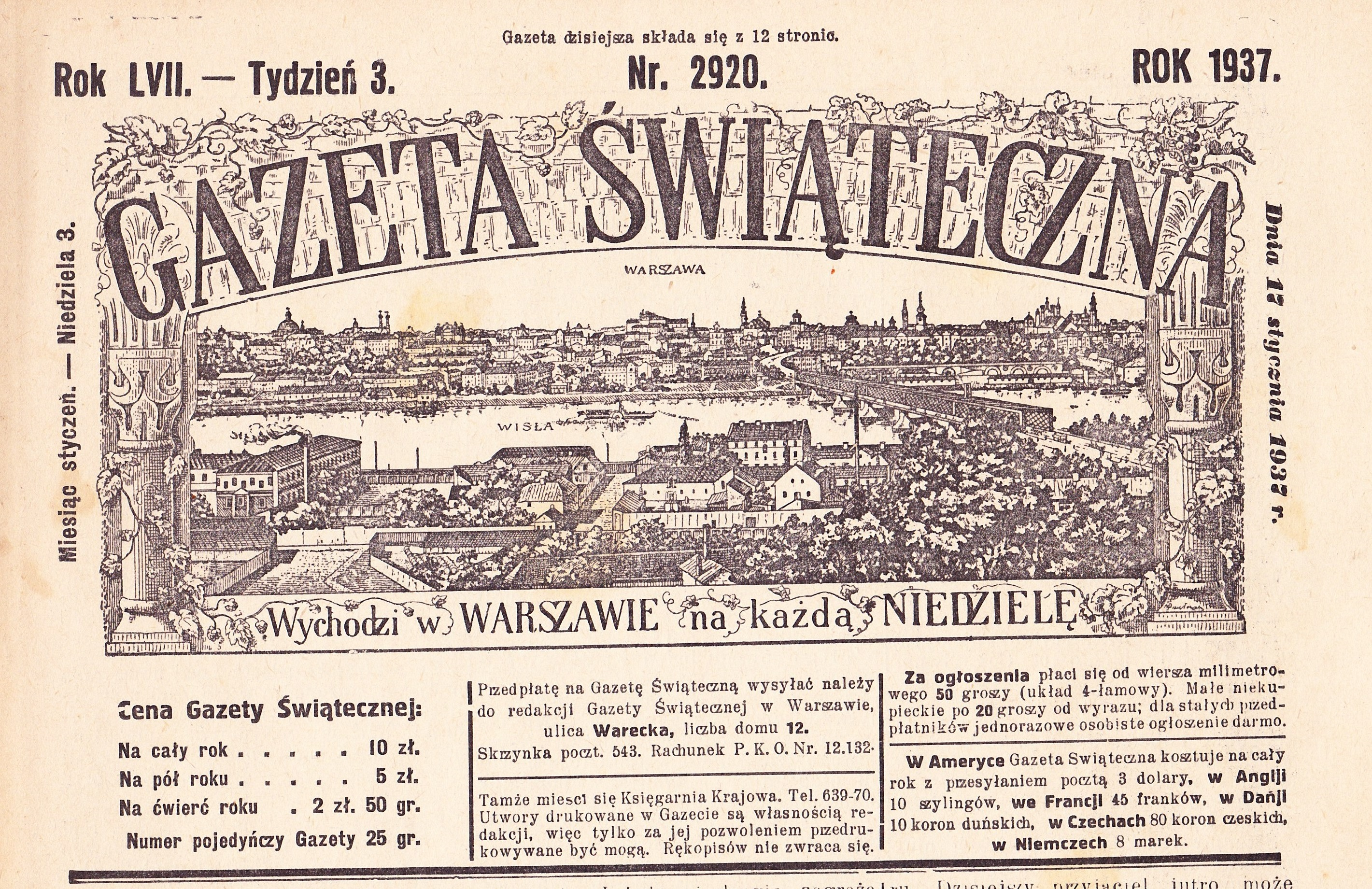 Tygodnik wydawany od 1881 r do 1939